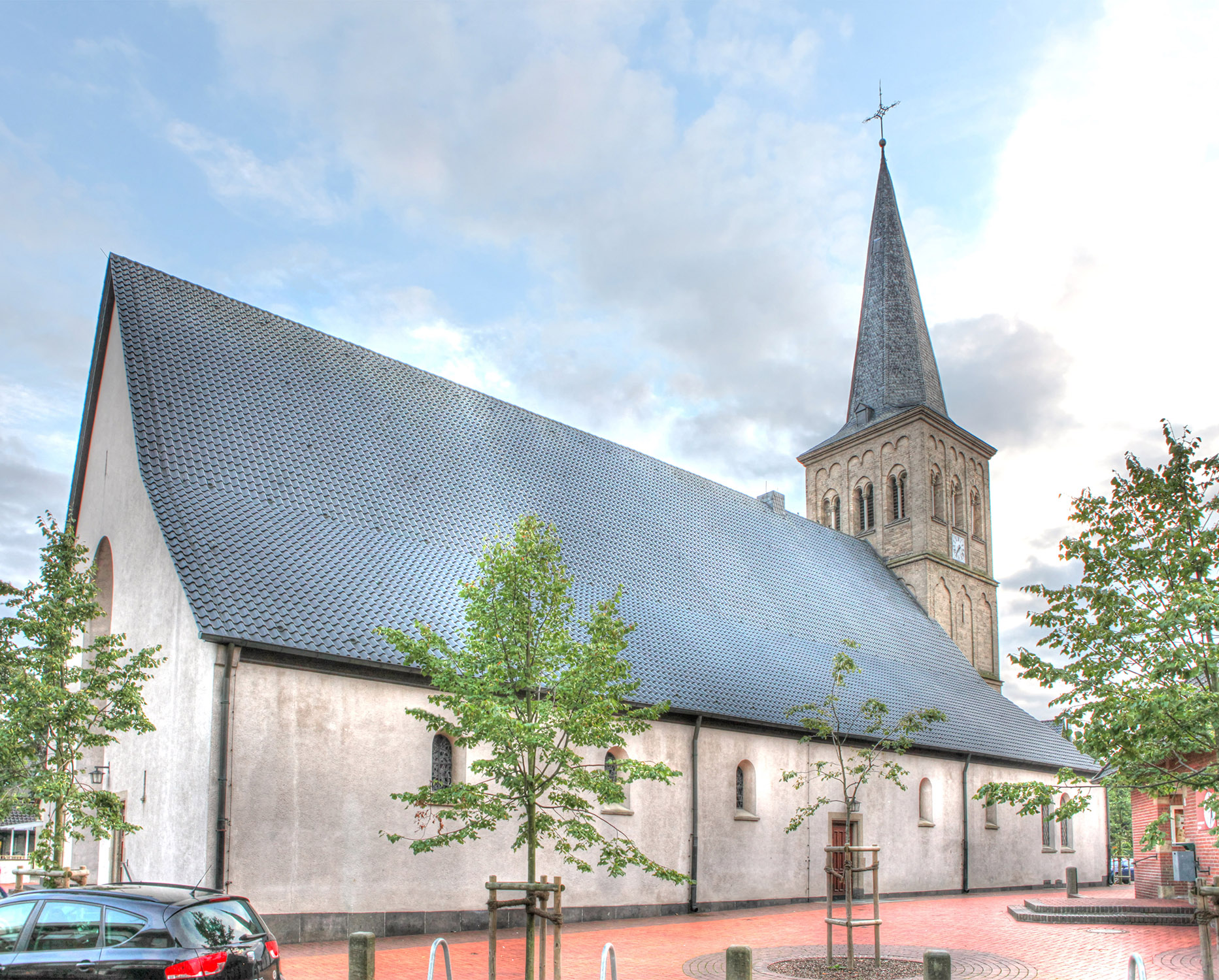 Katholische Pfarrkirche St. Pankratius Dingden (Hamminkeln)